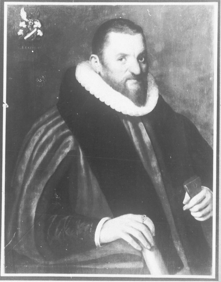 Peter Oeckhoven, Bürgermeister von Köln, 17. Jahrhundert